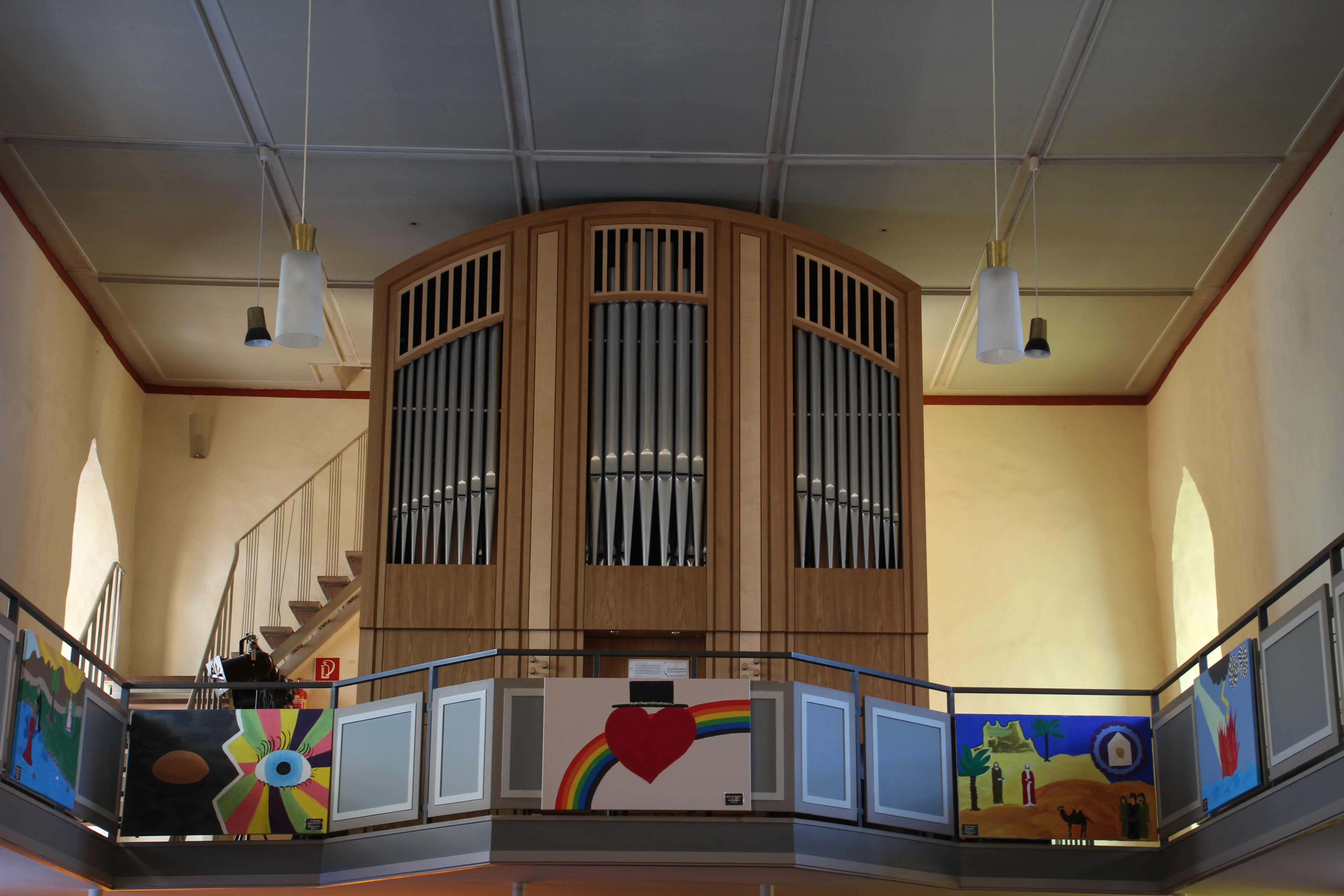 Ev. Kirche